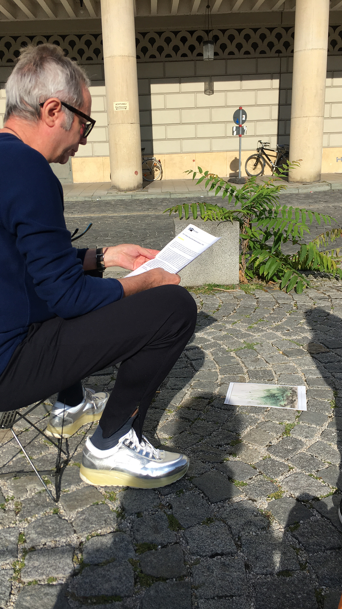 Porträt Franz Xaver Baier